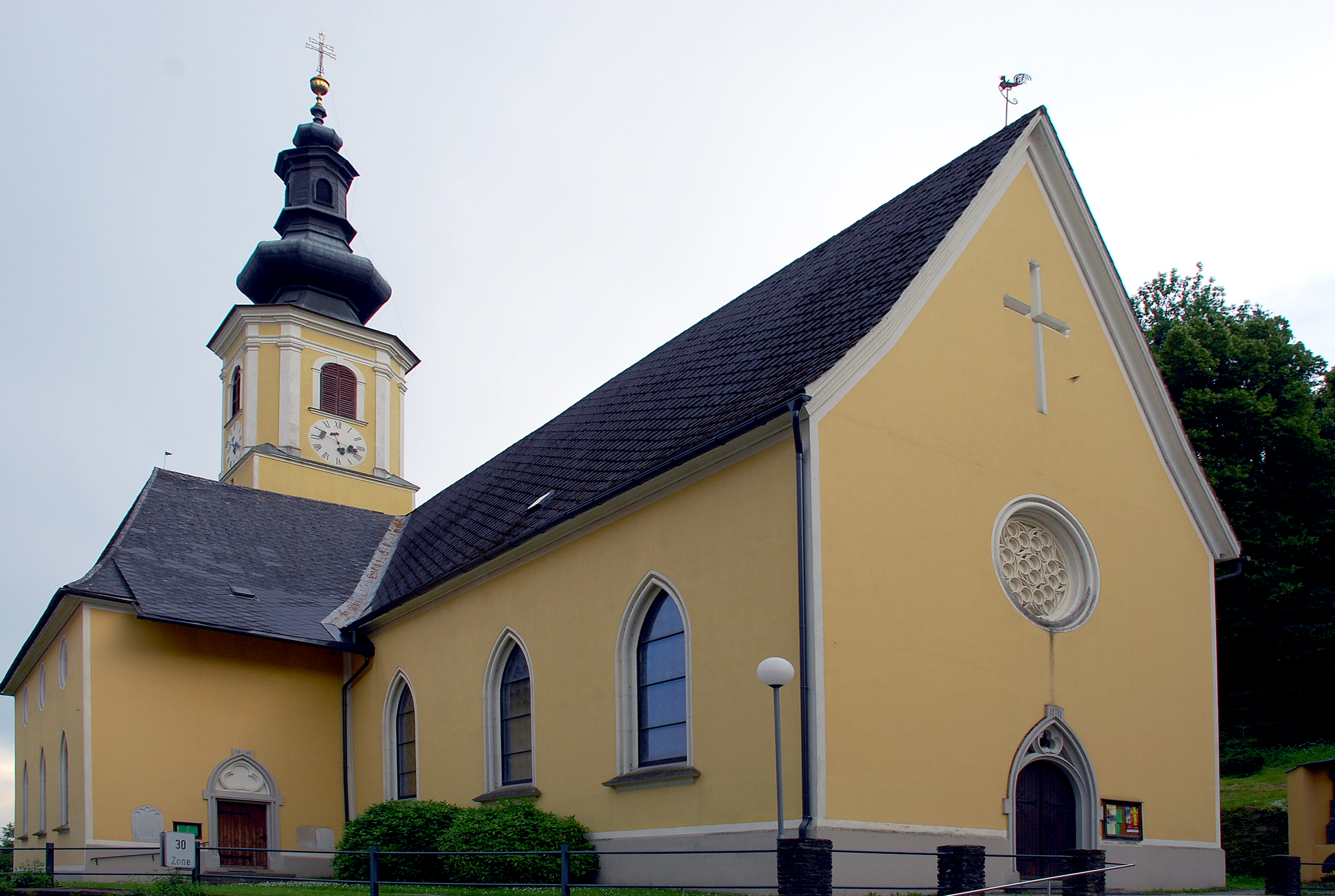 Schwanberg, Steiermark, Österreich: Pfarrkirche zum Hl. Johannes dem Täufer